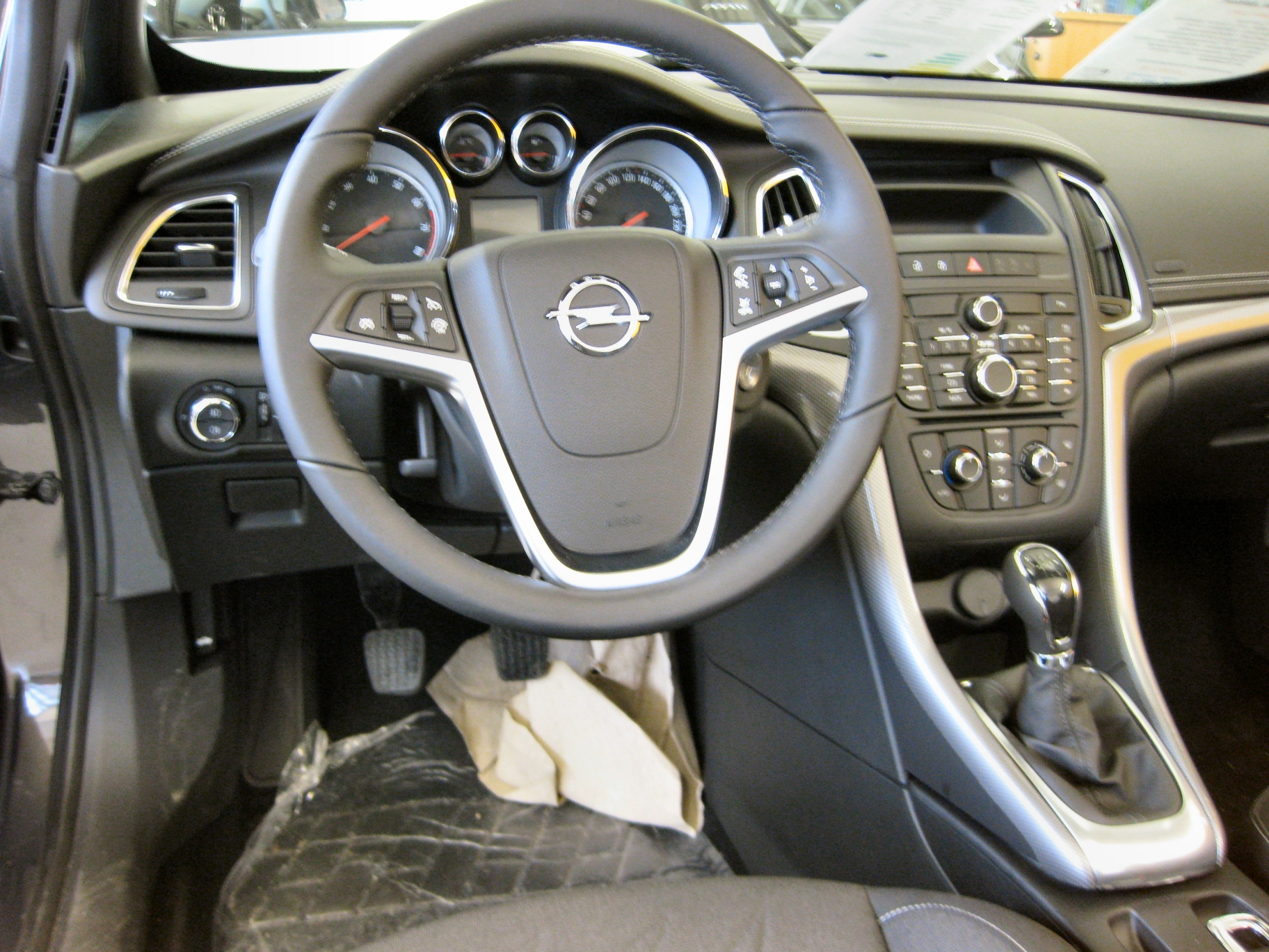 Opel Cascada Cockpit